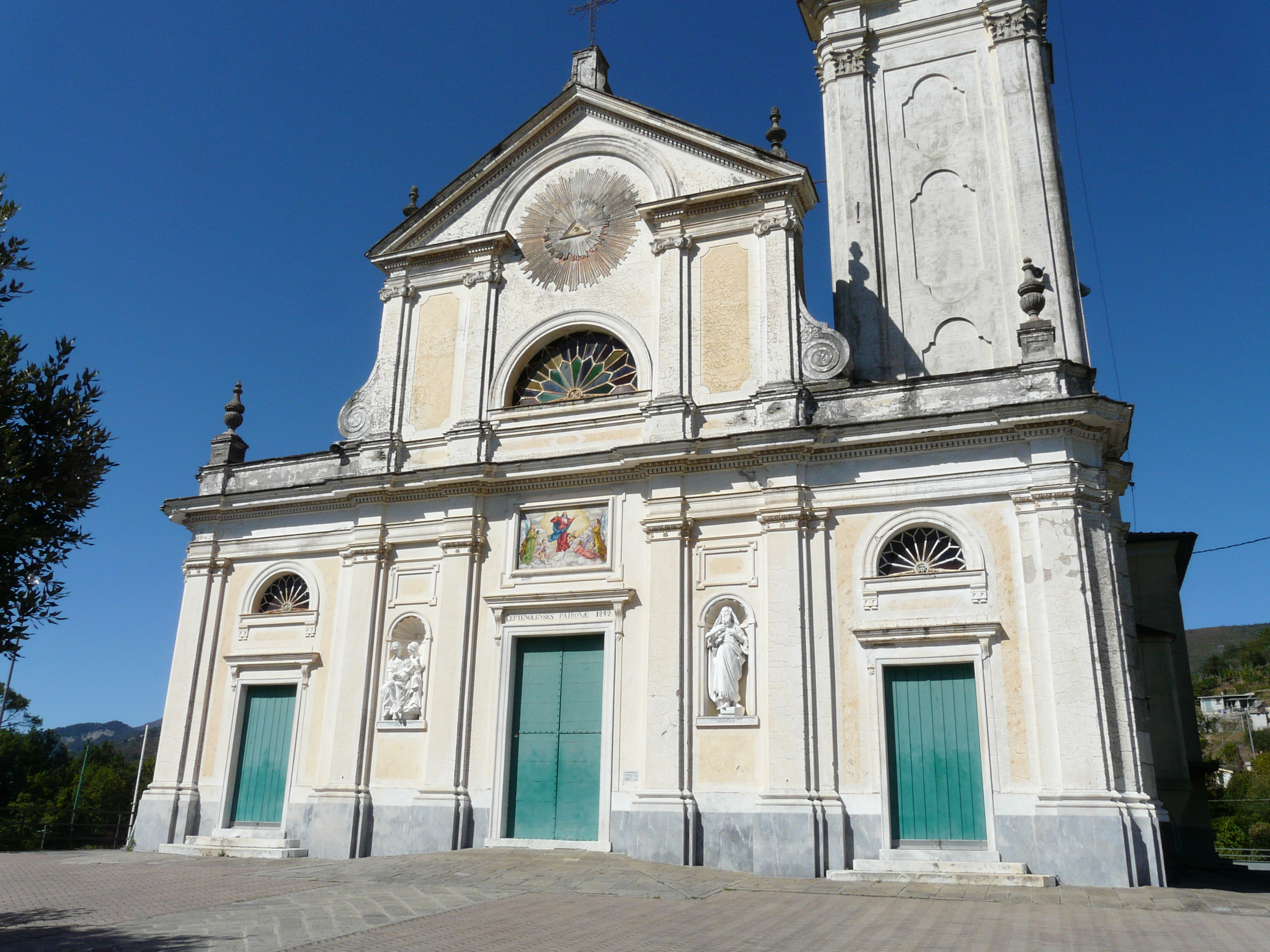 Chiesa di Santa Maria Assunta, Certenoli, San Colombano Certenoli, Liguria, Italia